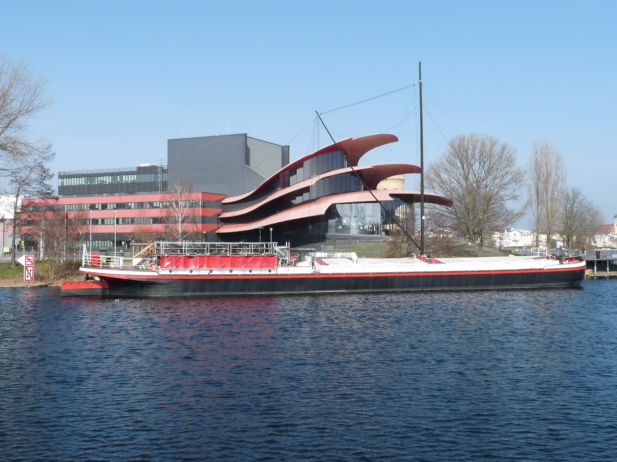 Der neue Liegeplatz befindet sich am Tiefen See an der Schiffbauergasse ganz in der Nähe des Hans Otto Theaters.